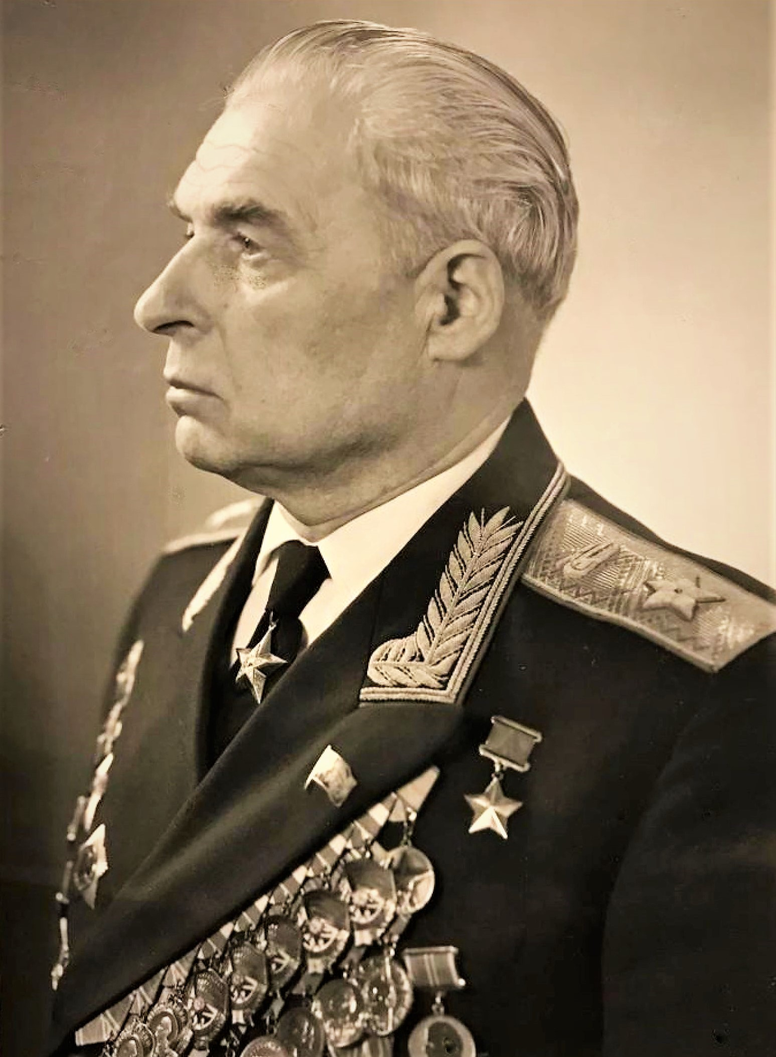 Маршал бронетанковых войск Герой Советского Союза Павел Павлович Полубояров